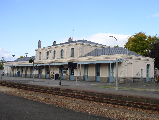 Photo Bruno Robert : "Gare de Flers, les quais"